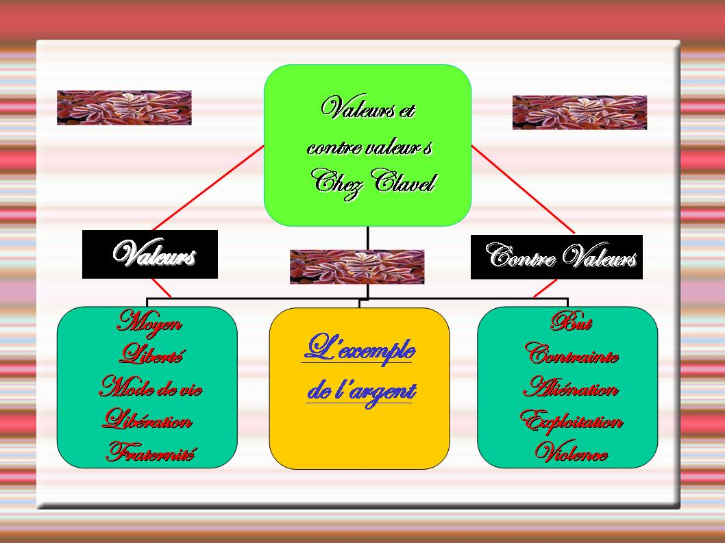 Schéma :l'argent comme valeur et contre-valeur chez Bernard Clavel